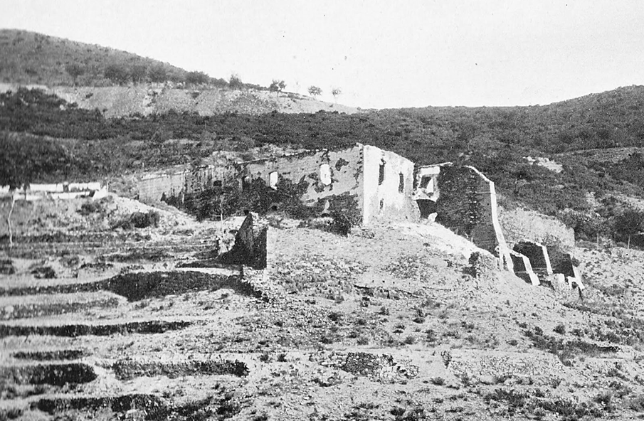 El monasterio de San Jerónimo del Valle de Hebrón en ruinas, principios del siglo XX.